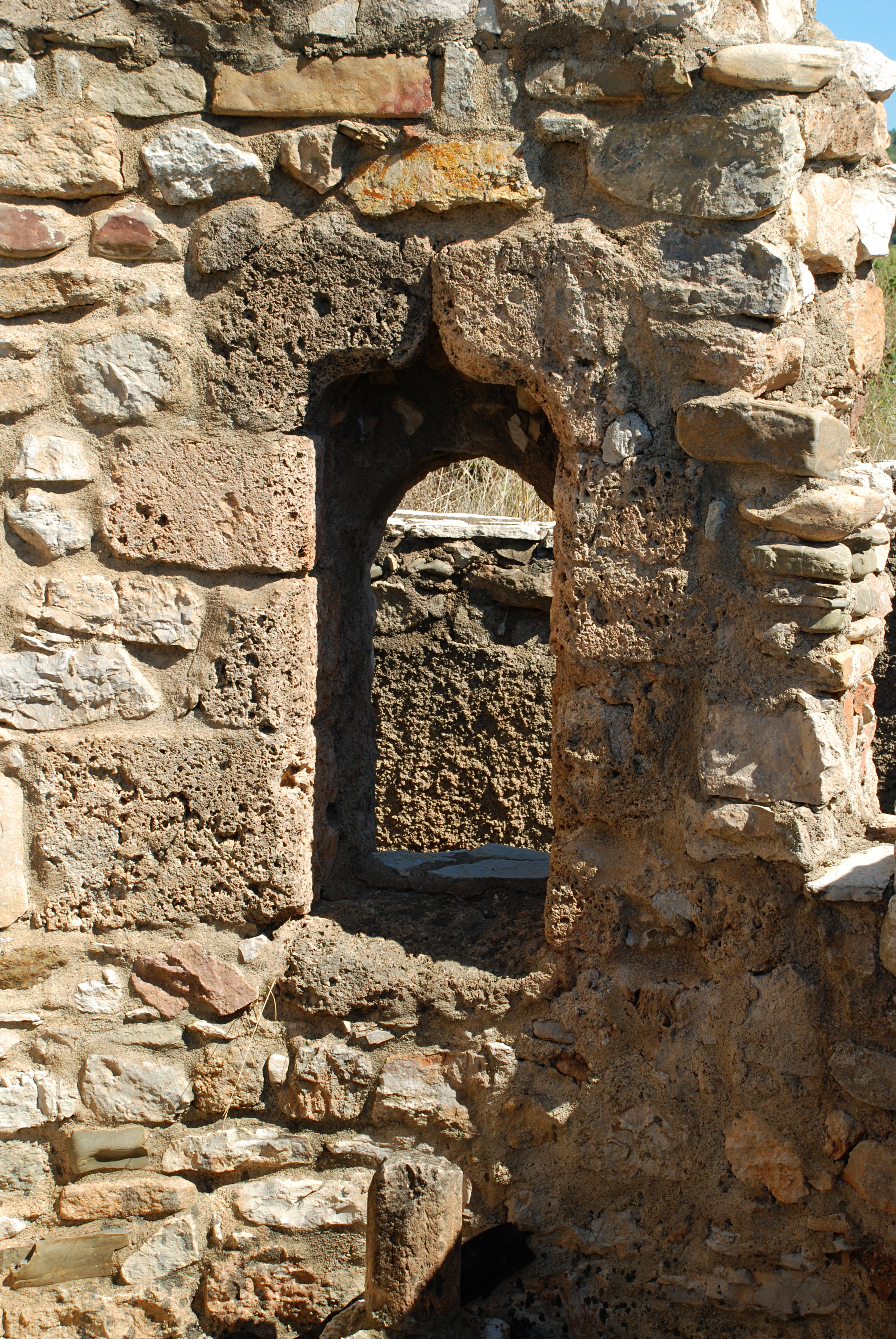 France - Languedoc - Hérault - Cessenon-sur-Orb - Chapelle Sainte-Anne